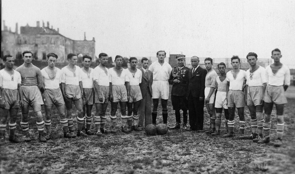 Футбольна команда "Гасмонея" (Рівне)